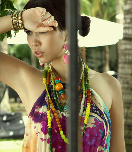 Vũ Nguyễn Hà Anh